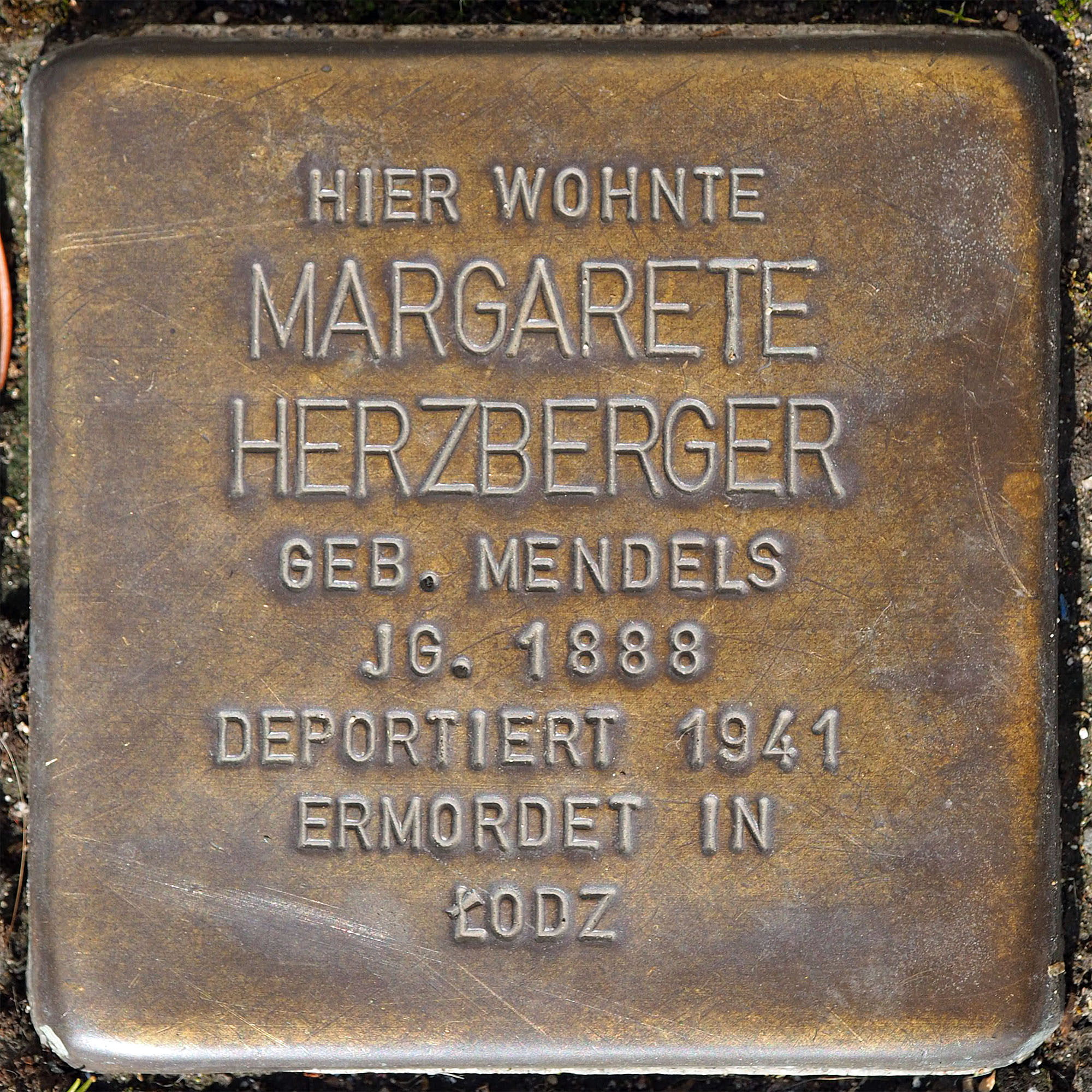 Stolpersteine MG: Herzberger, Margaete